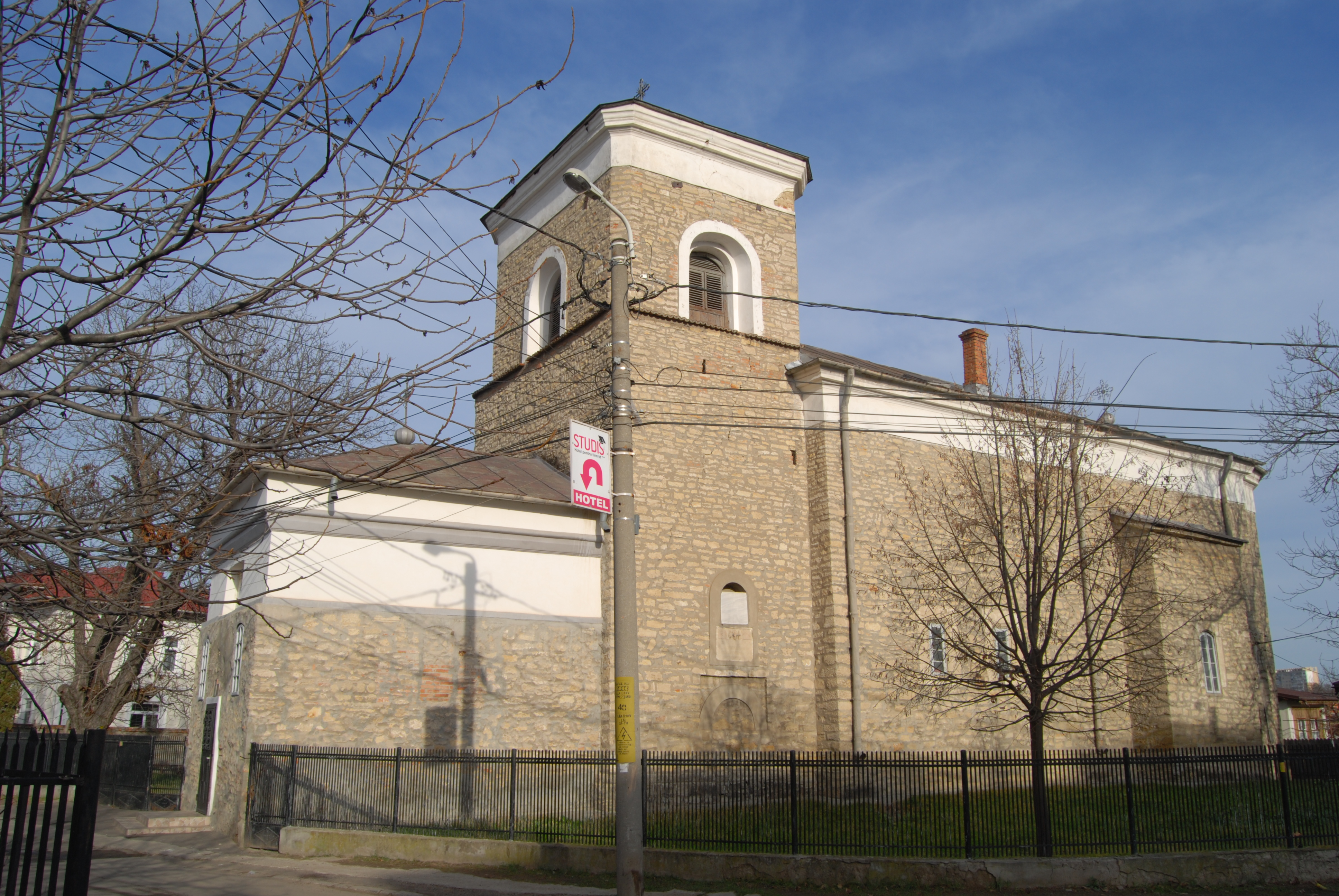 Biserica "Sf. Ioan Gură de Aur" cu mormântul lui Barbu Lăutarul